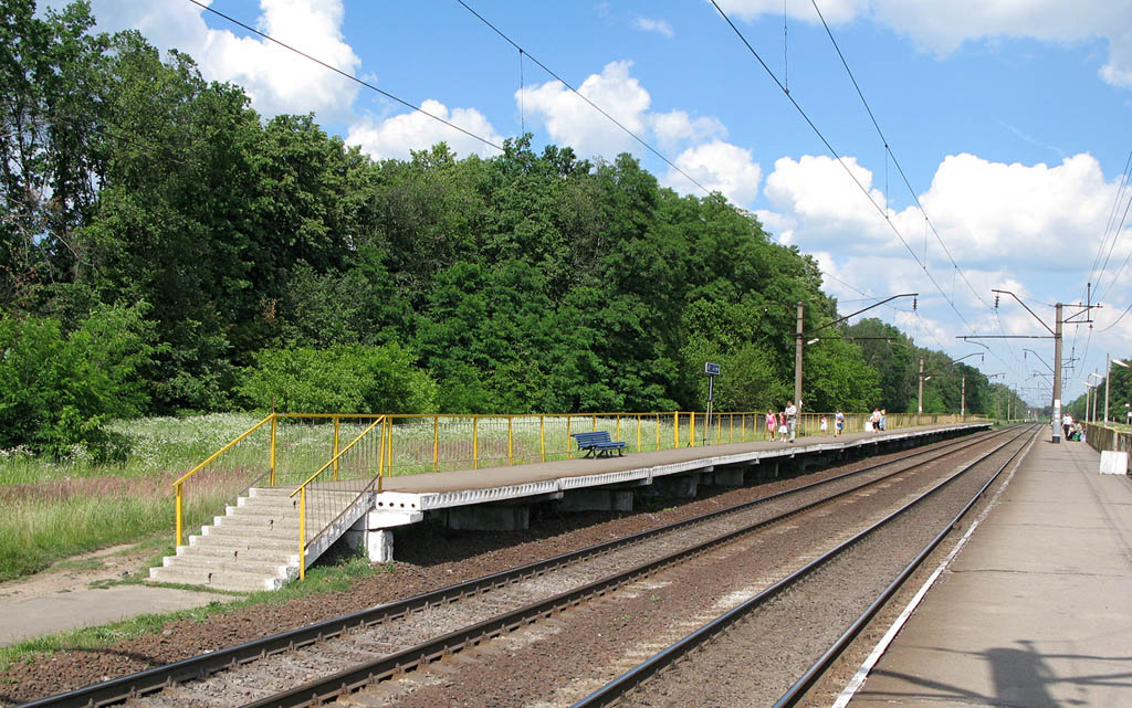 Платформа непарного напрямку